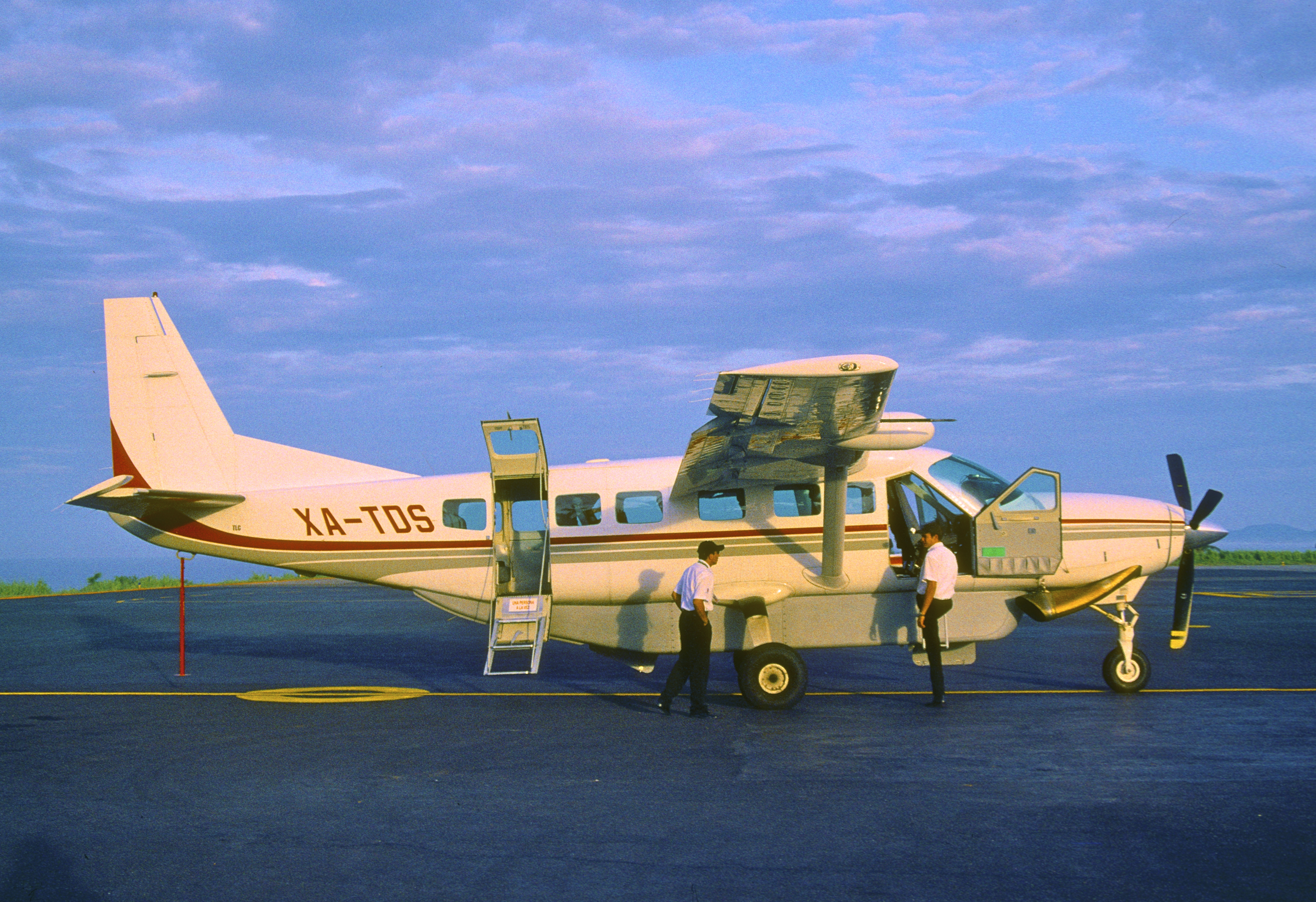 My ride for Puerto Escondido - Oaxaca that day...